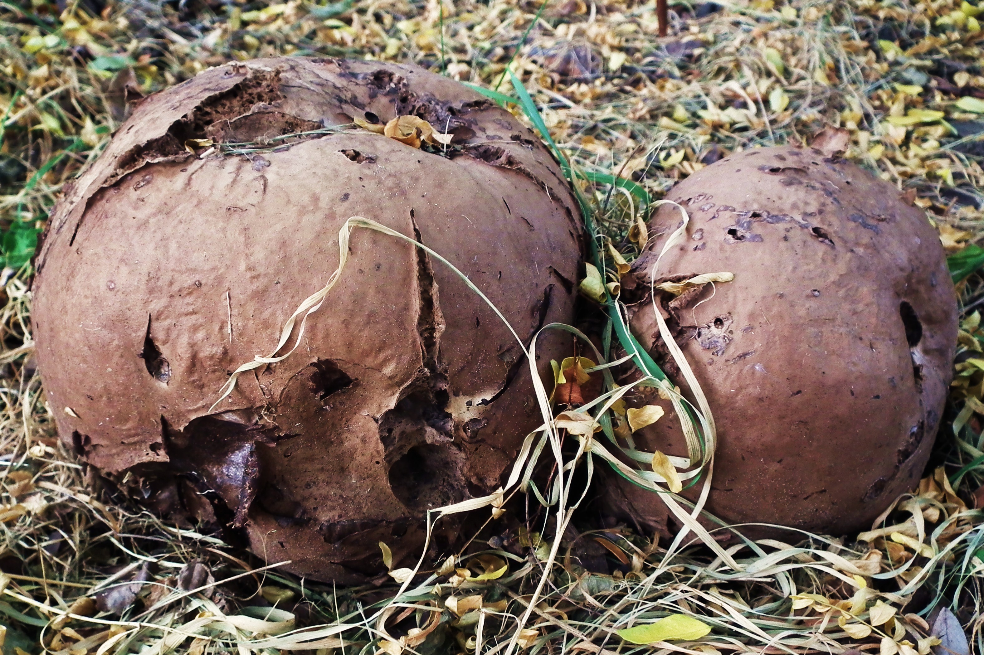 Czasznica olbrzymia w ogrodzie dendrologicznym w Poznaniu.